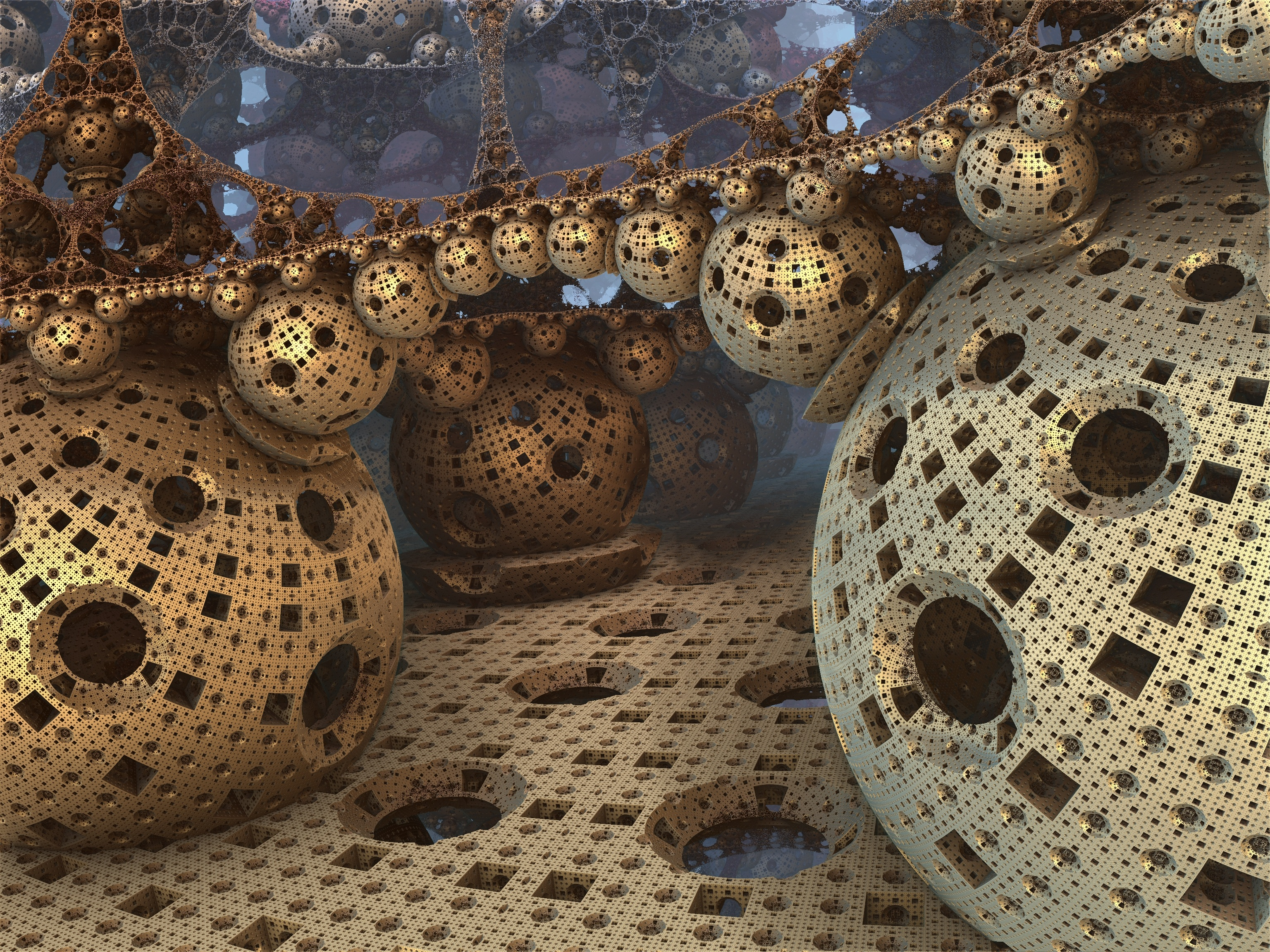 Labyrinthe 3D modélisé en design fractale avec un rendu éponge (menger).